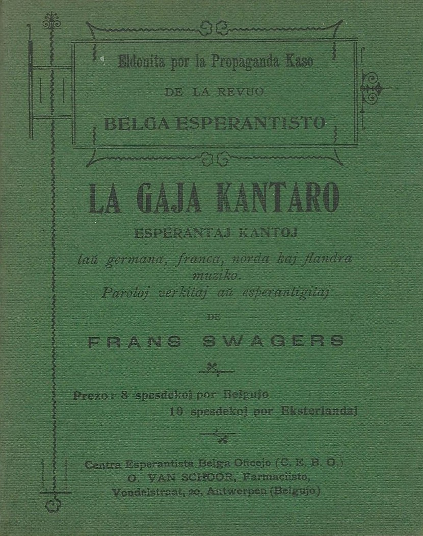 librokovrilo de "La Gaja Kantaro", 1928